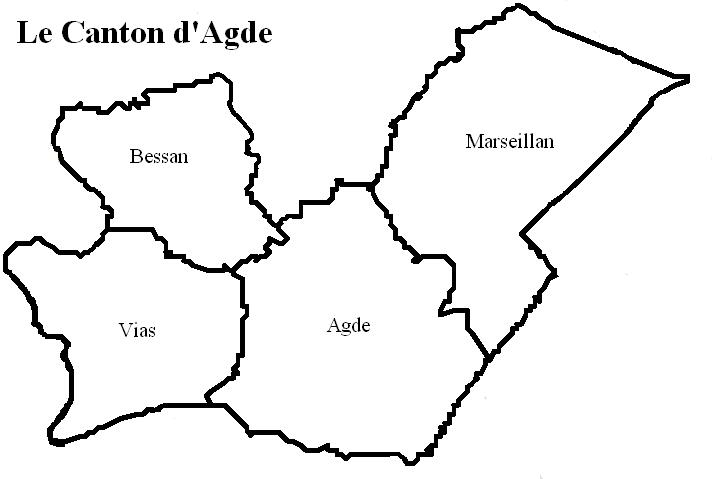 Le canton d'Agde (Hérault) Image personnelle